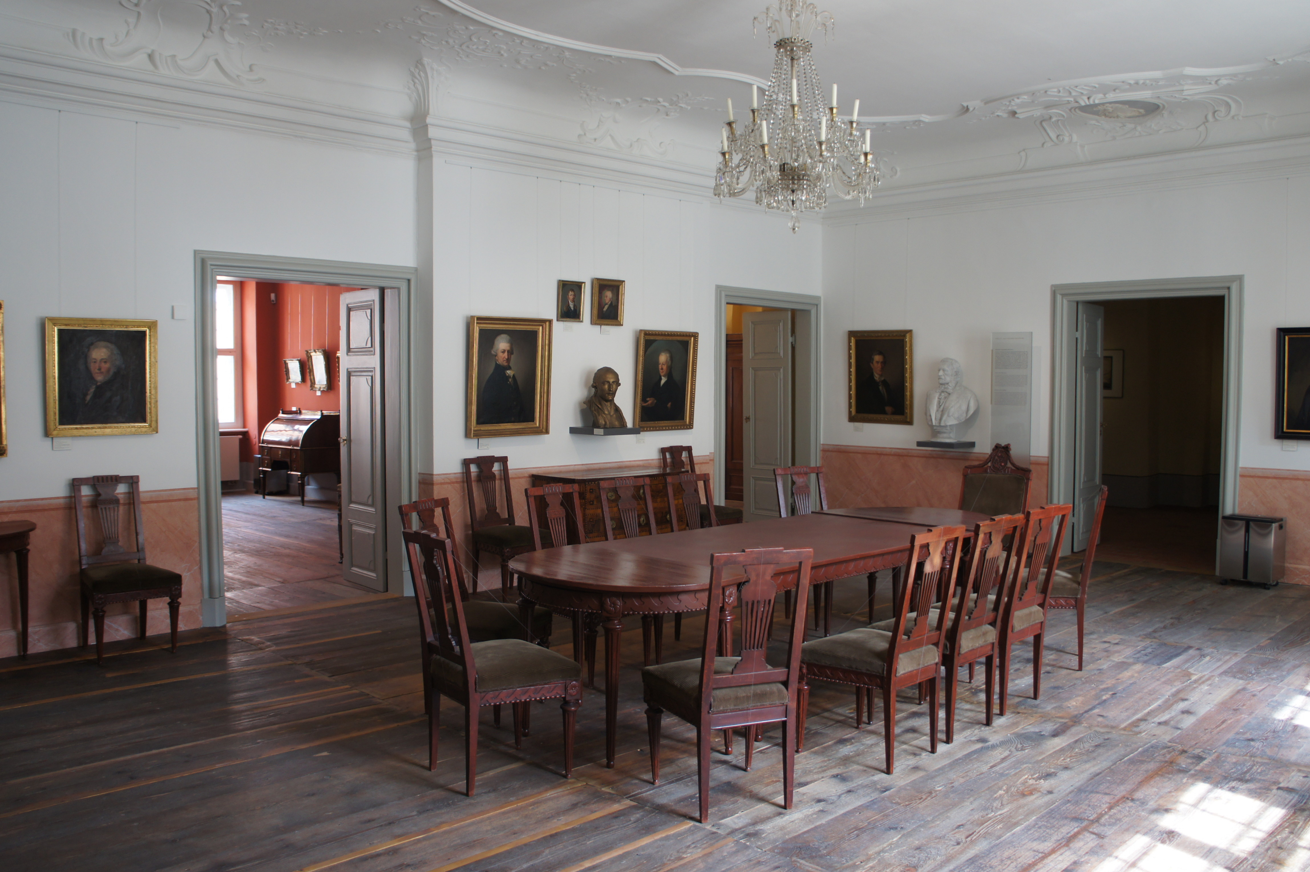 Oberlausitzische Gesellschaft der Wissenschaften, Neißstraße 30, Görlitz. Bibliothek der Gesellschaft nach der Sanierung 2011. Hier der große Versammlungssaal. Originales Mobiliar, an den Wänden Gemälde und Büsten der Präsidenten